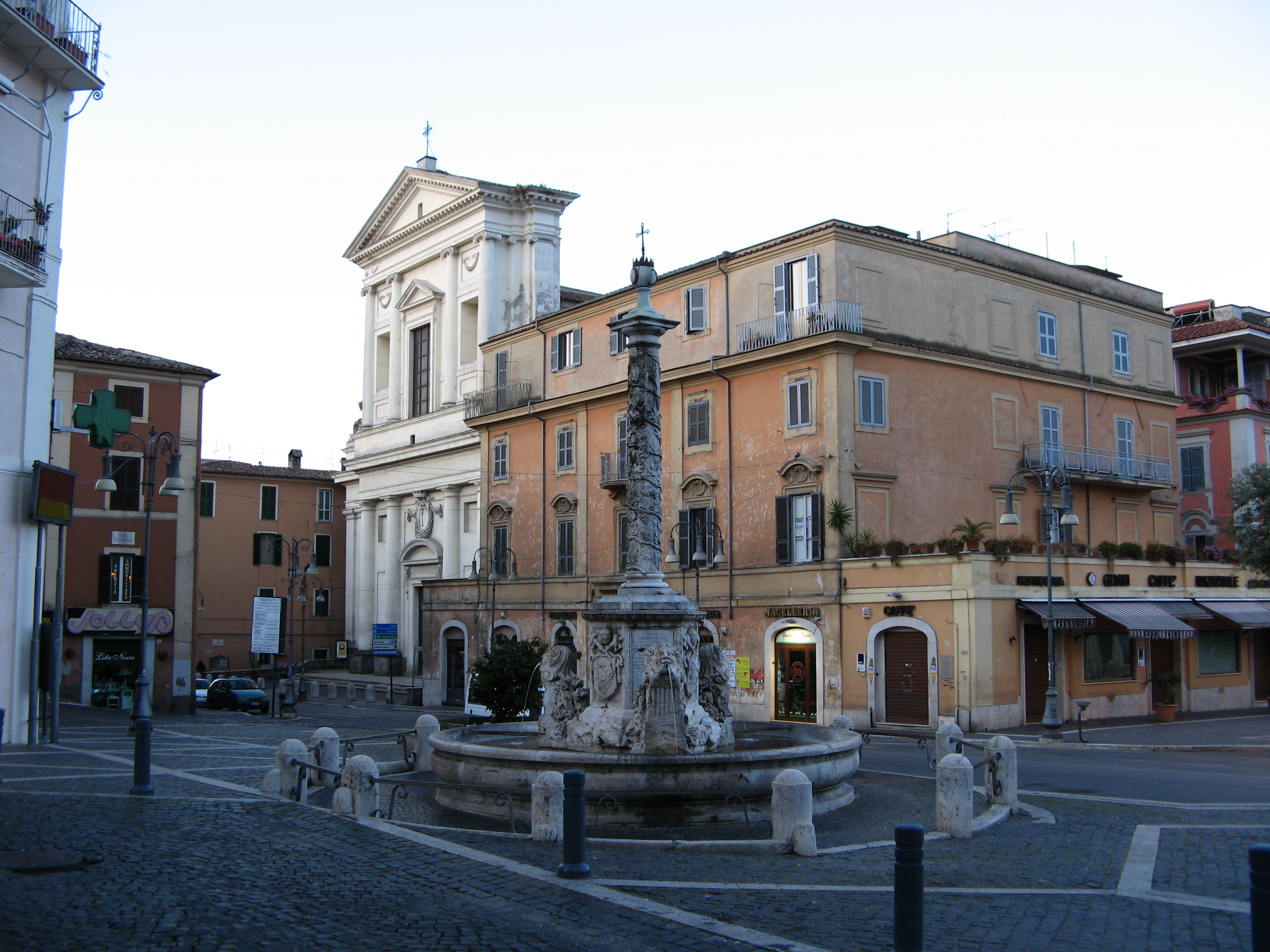 Genzano di Roma: Piazza San Sebastiano e Chiesa della Santissima Trinità